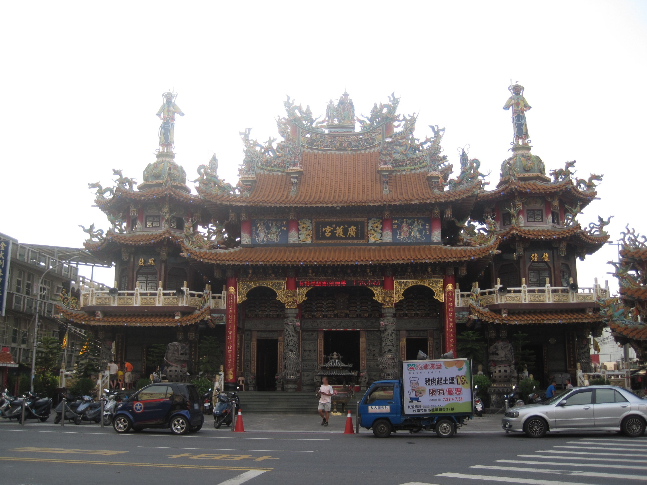 大灣廣護宮